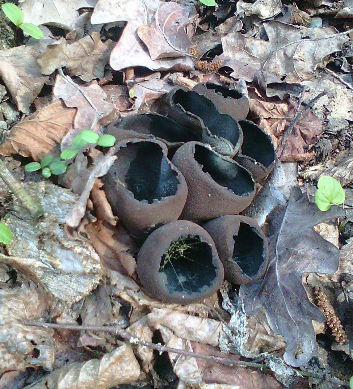 Весна 2017, Київська обл.